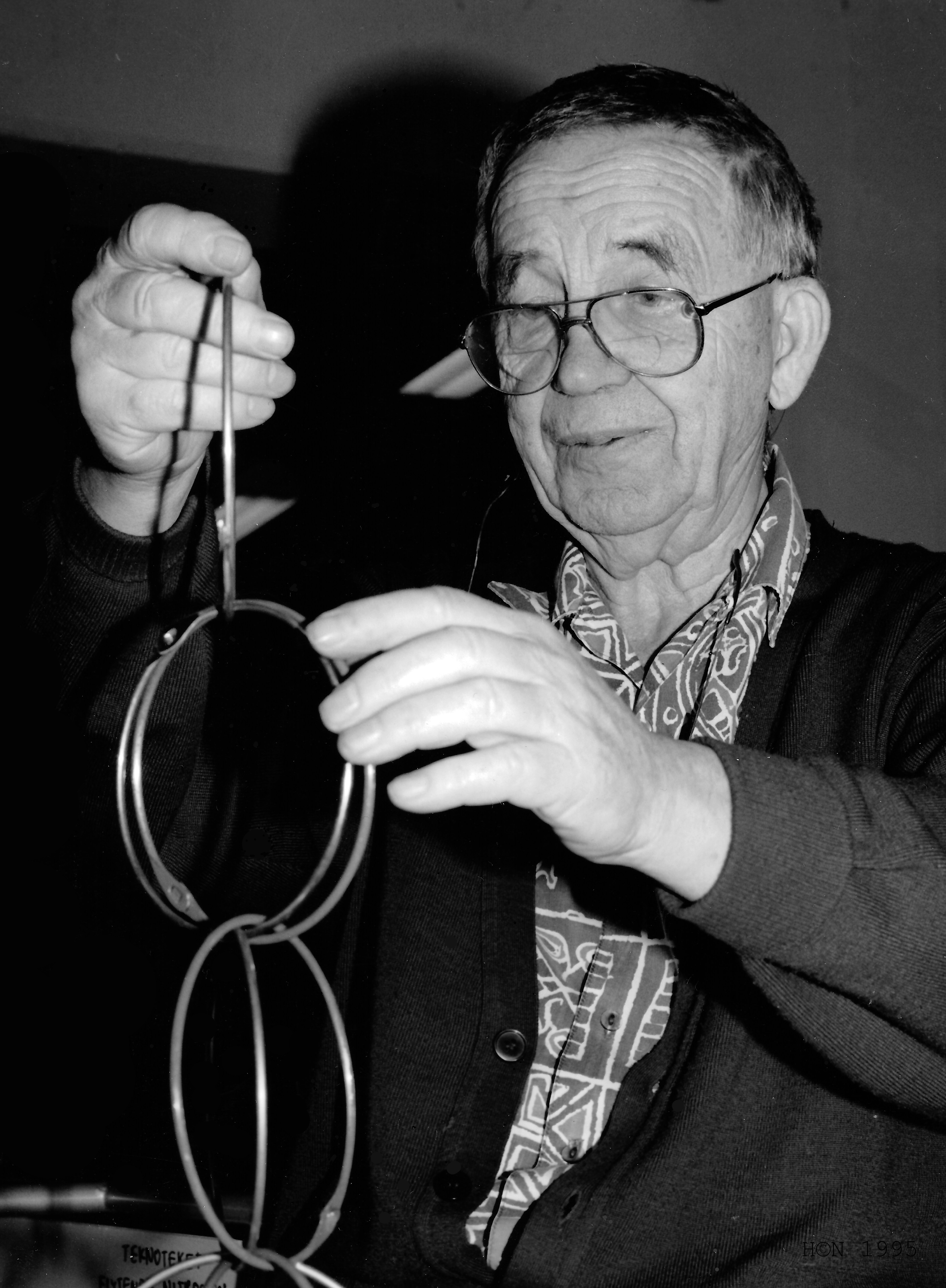 Otto Øgrim på Teknisk Museum 1995